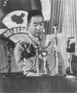 1949年9月21日，中国人民政治协商会议第一届全体会议在北平召开，薄一波以华北解放区首席代表出席并在会上发言